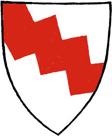 Wappen des Ministerialengeschlechtes von Pyrmont (auch Pirmunt, Pirmont)aus der Eifel